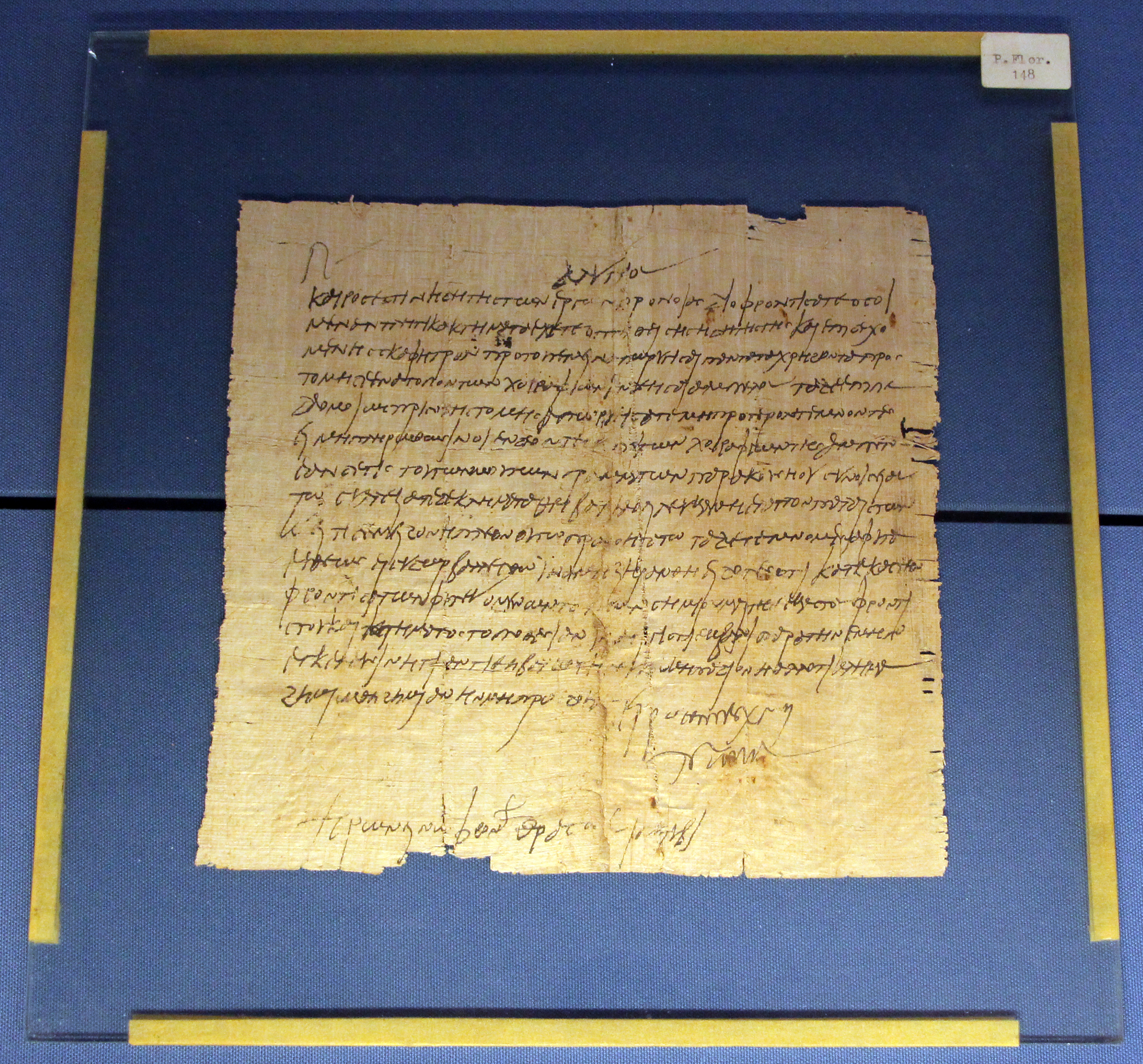 Biblioteca Medicea Laurenziana